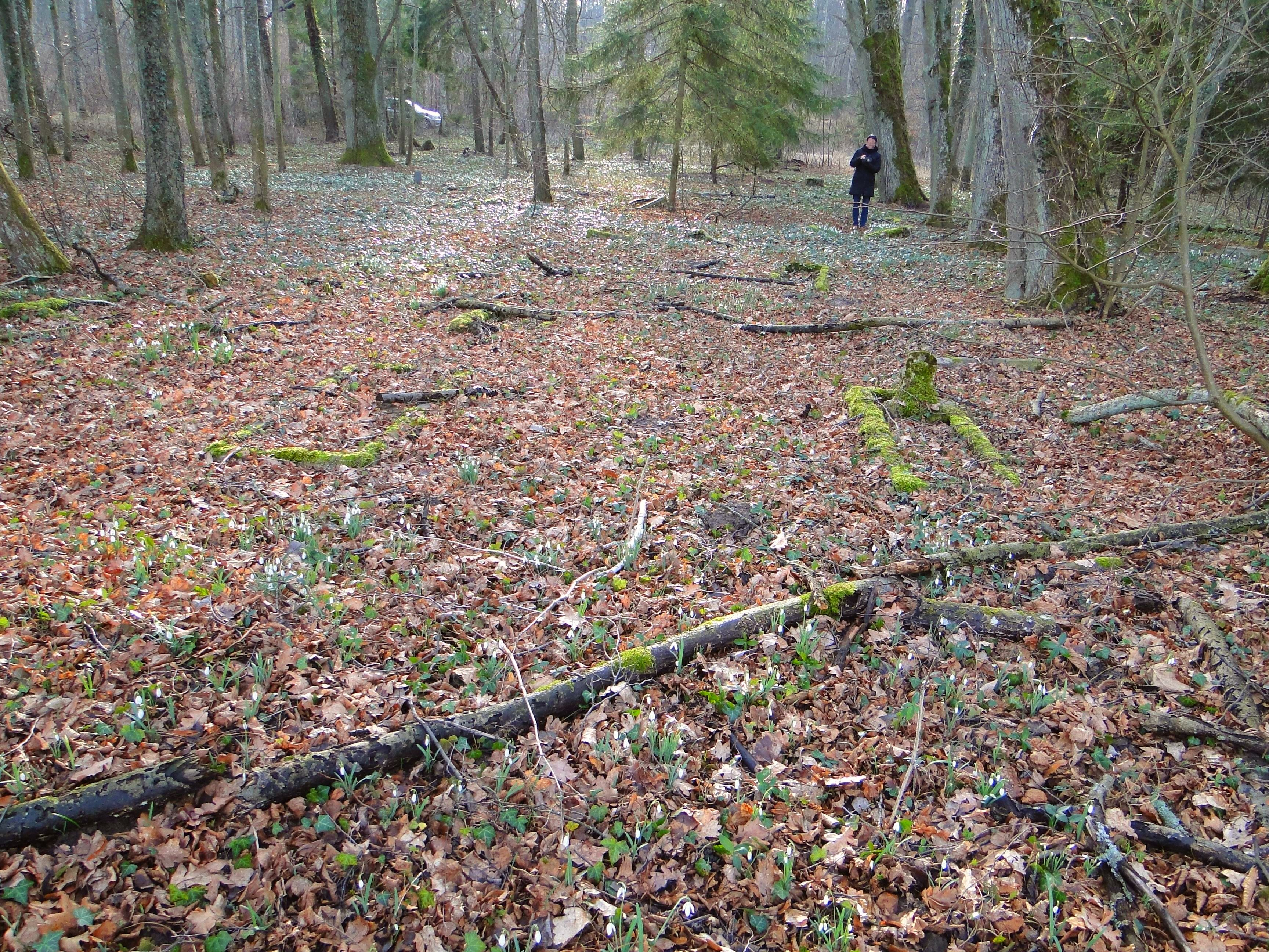 Pozostałości po cmentarzu